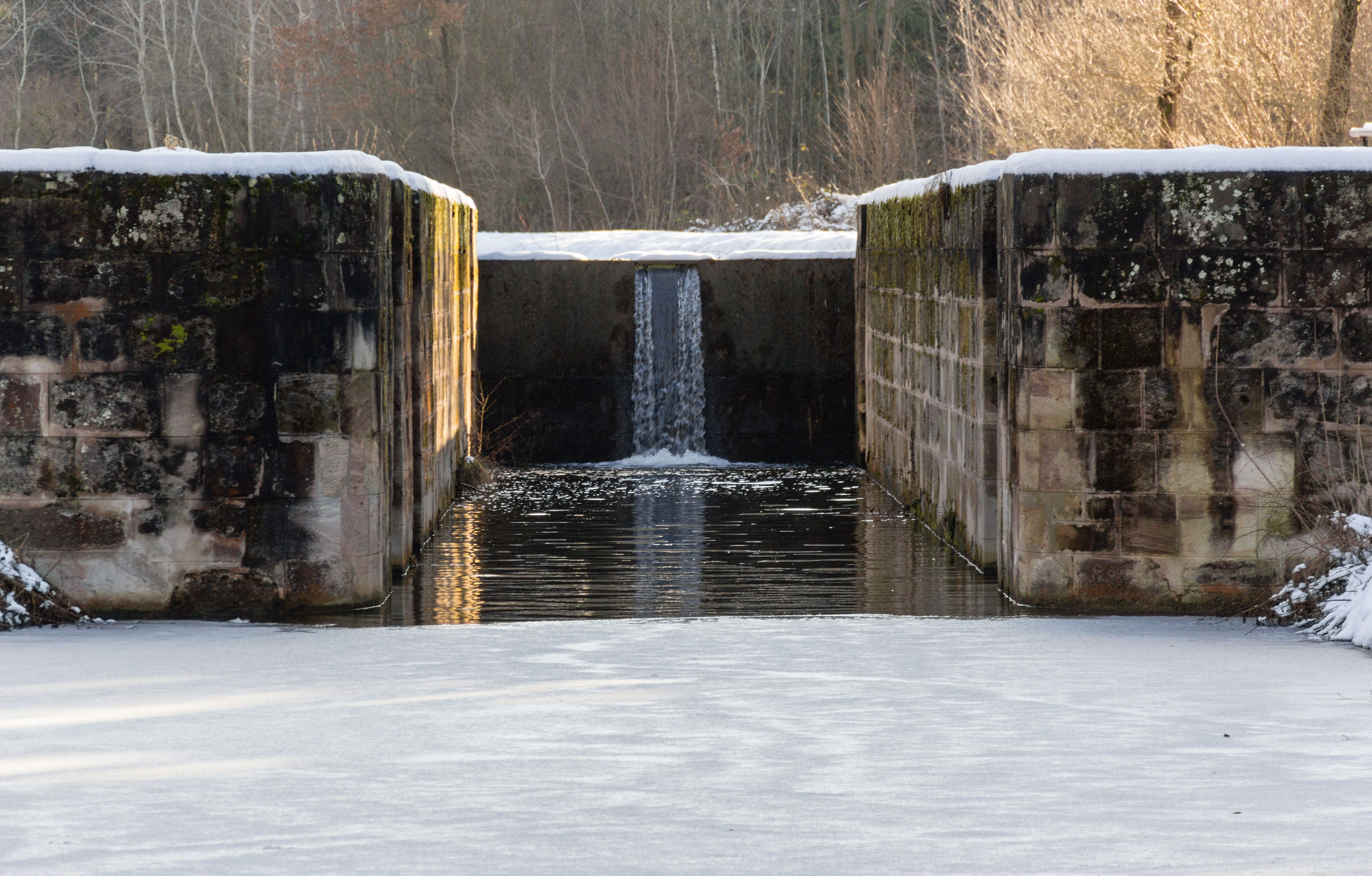 Ludwig-Donau-Main-Kanal, Schleuse 59This is a photograph of an architectural monument.